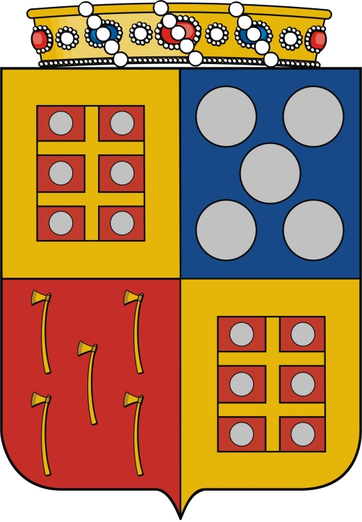 Esquartelado: I e IV - Melo: de vermelho com uma cruz de ouro, acompanhada de seis besantes de prata nos vãos; bordadura de ouro; II - Novais: de azul, com cinco novelos de prata postos em aspa; III - Machado: de vermelho, com cinco machado de prata encambados de ouro postos em aspa. Coroa de Barão.